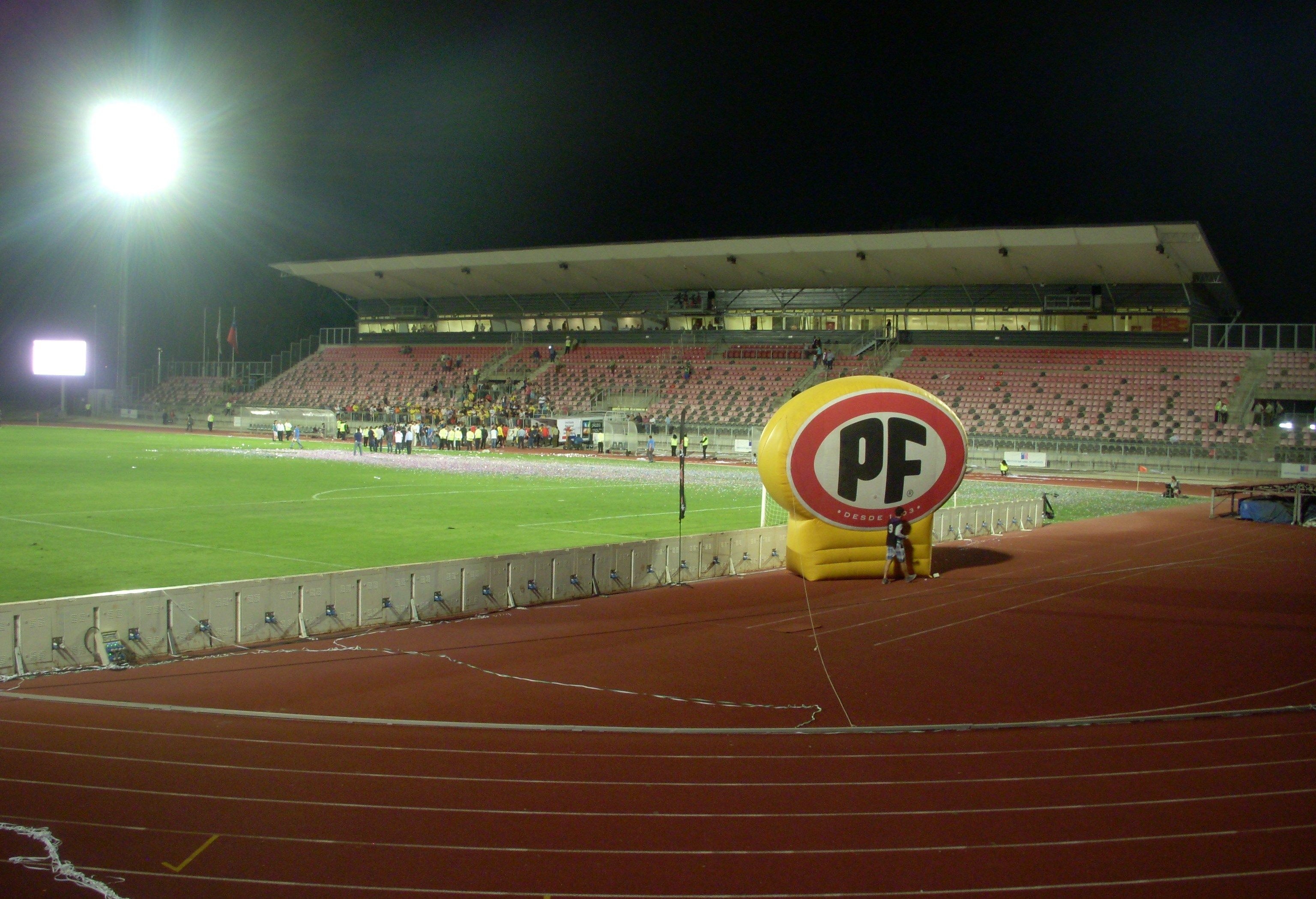 Estadio Fiscal de Talca